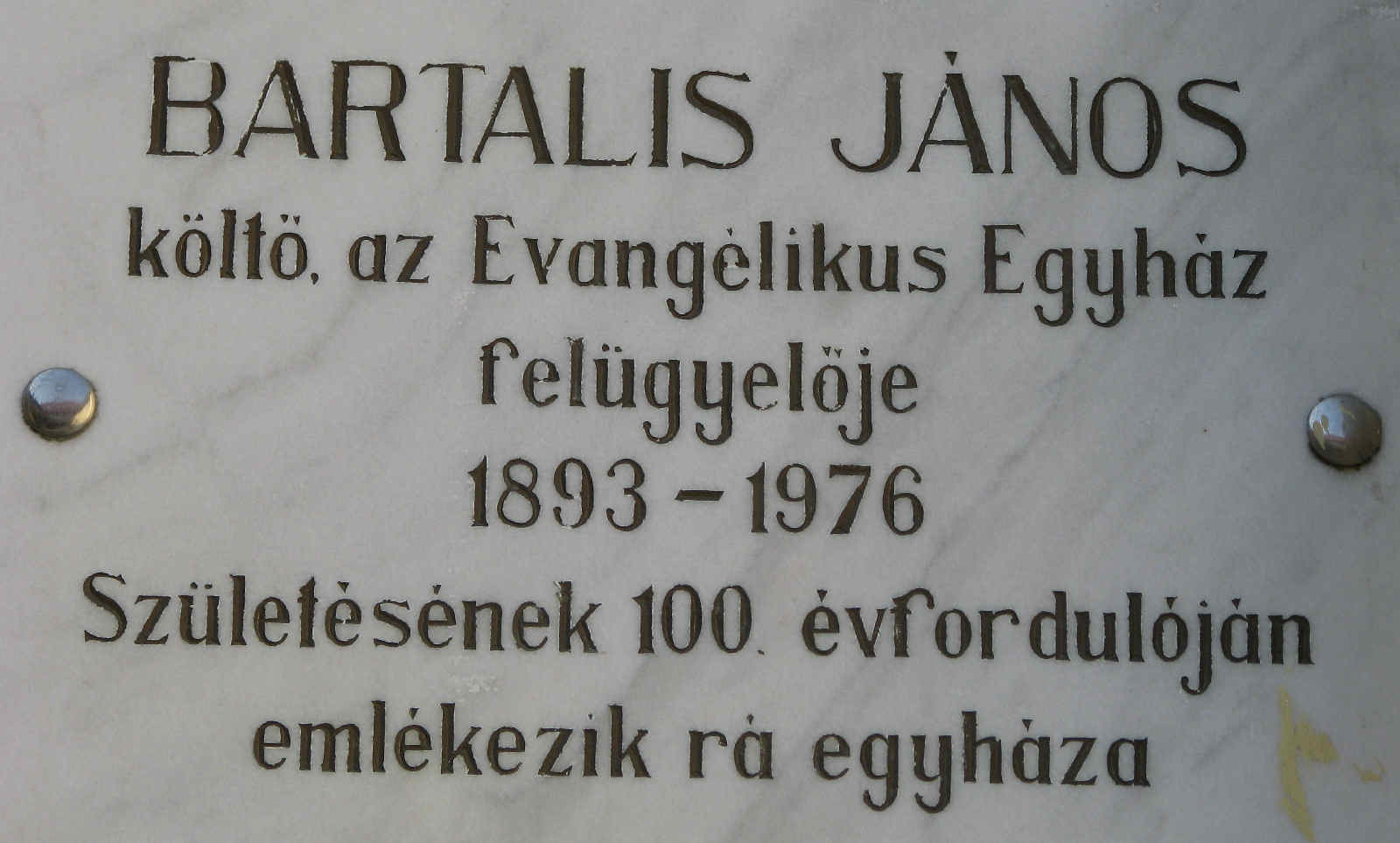 Bartalis János emléktáblája Kolozsváron az evangélikus püspökség udvarán